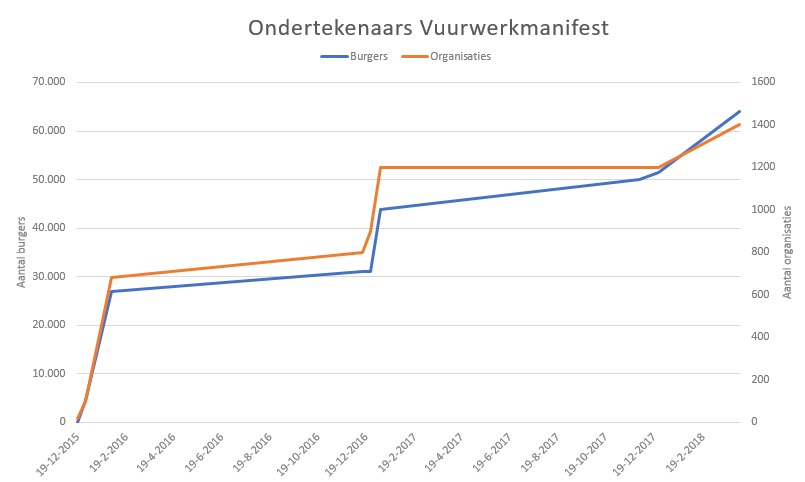 Ontwikkeling van het aantal organisaties en burgers (particulieren) het Vuurwerkmanifest heeft ondertekend sinds 19 december 2015, toen het online werd geplaatst. De cijfers zijn gebaseerd op de aantallen genoemd in de media en door de initiatiefnemers zelf. Het Vuurwerkmanifest begon in april 2018 met 8 artsenorganisaties (vooral oogheelkundigen) en groeide langzaam tot 18 organisaties op 19 december 2015, toen werd besloten het manifest online te publiceren, uitgebreid de publiciteit op te zoeken en tevens het voor individuele burgers mogelijk te maken om te ondertekenen. Het aantal ondertekeningen nam fors toe na de jaarwisseling van 2016 op 2017. Tussen de jaarwisselingen is de groei slechts geleidelijk. Er is twijfel over het aantal ondertekenende organisaties tussen januari 2017 en januari 2018, dat virtueel gelijk zou zijn gebleven rond 1200 (volgens één bron 1180, volgens een andere bron 'ruim duizend', vermoedelijk flink afgerond naar beneden), maar plots met 200 zou zijn gestegen tussen 1 januari 2018 en 7 april 2018. Meer gegevens zijn nodig om de precieze historie weer te geven.